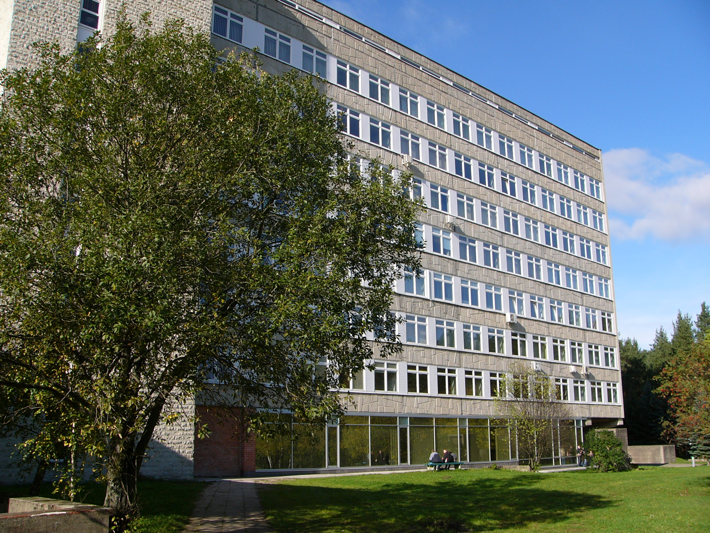 Saulėtekio al 9